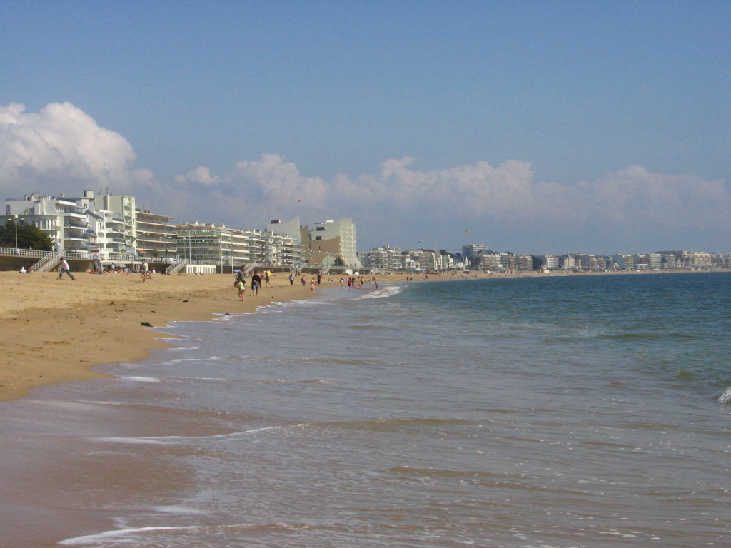 Photo prise par Francisco Silva (moi) à La Baule, France en avril 2006. La moitié gauche de la photographie (plage et édifices la bordant, jusqu'aux immeubles aux toits en pointe inclus) est sur le territoire de La Baule. Dans la moitié droite, le littoral est à Pornichet (plage des Libraires).